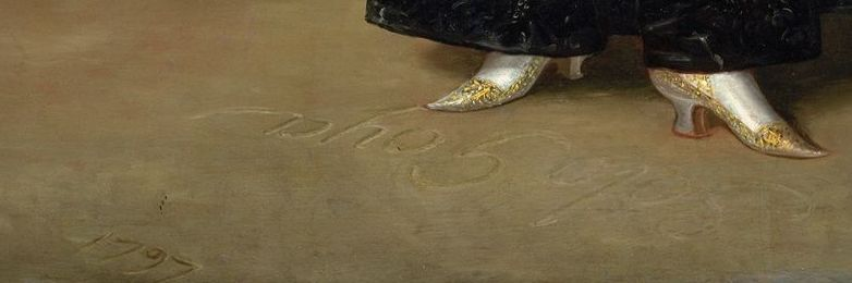 Francisco de Goya, Herzogin von Alba, Detail Solo Goya, 1797